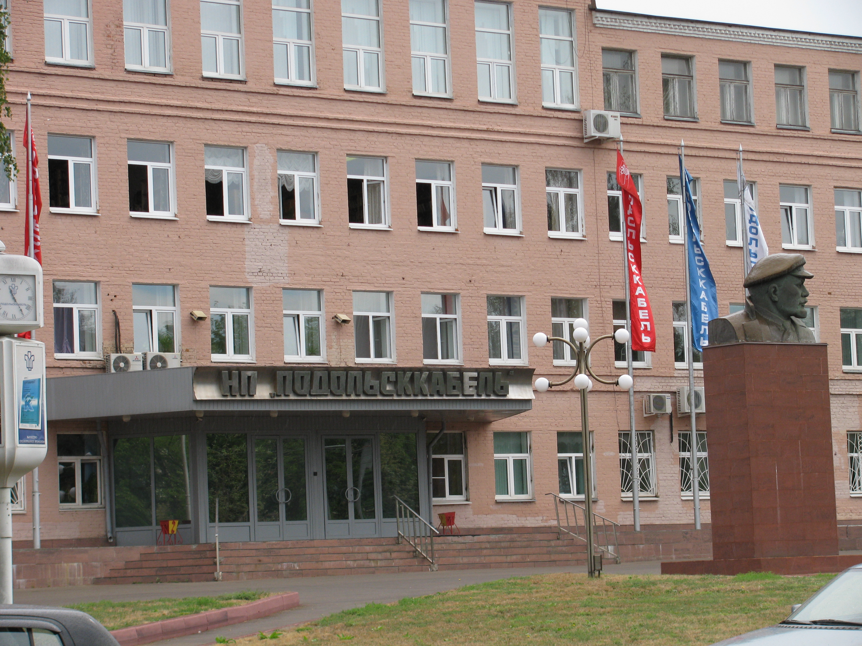 НП "Подольсккабель"